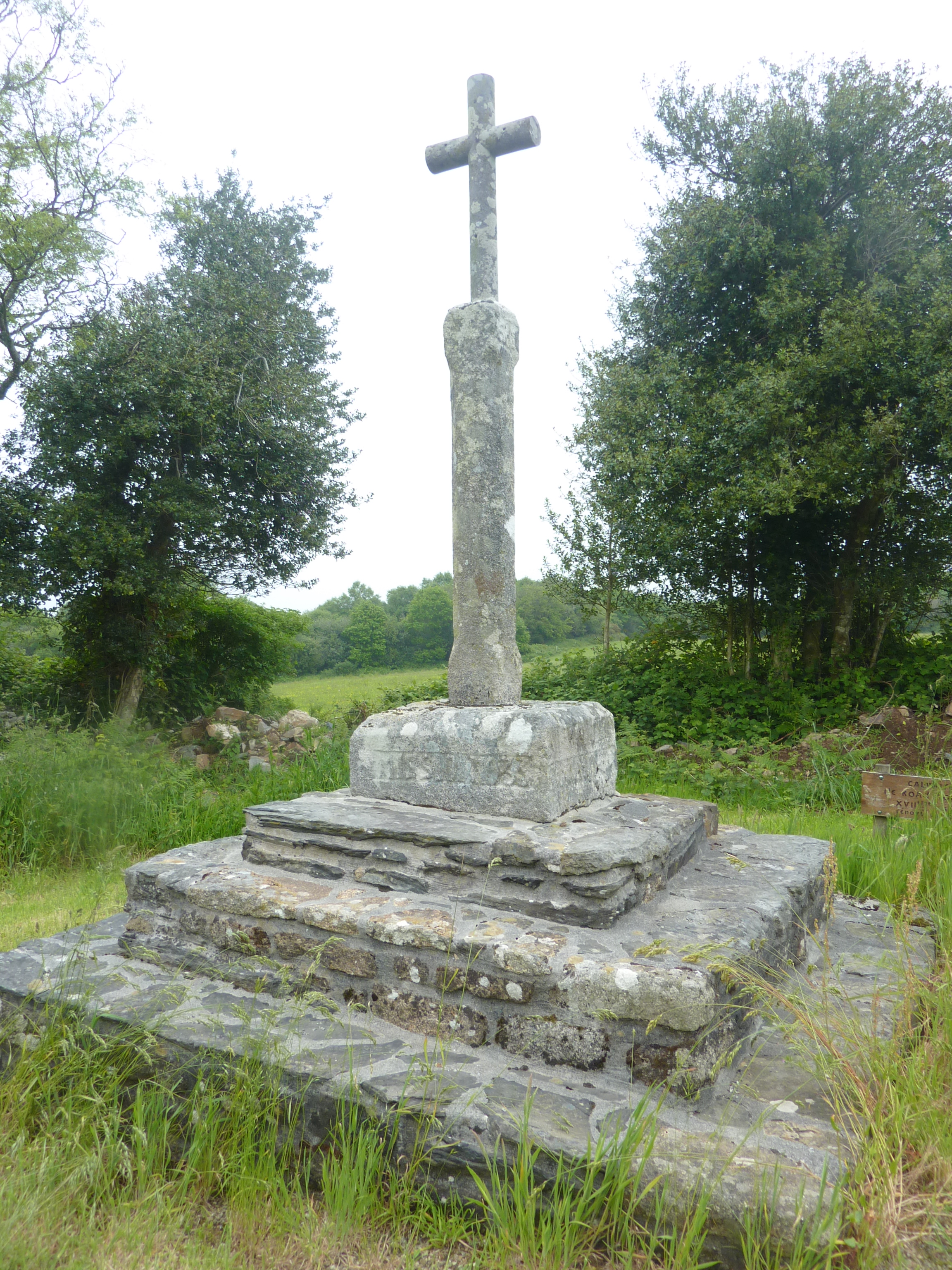 Gouézec : le calvaire de Coat Moennec ; il porte l'inscription : "Mission 1933"